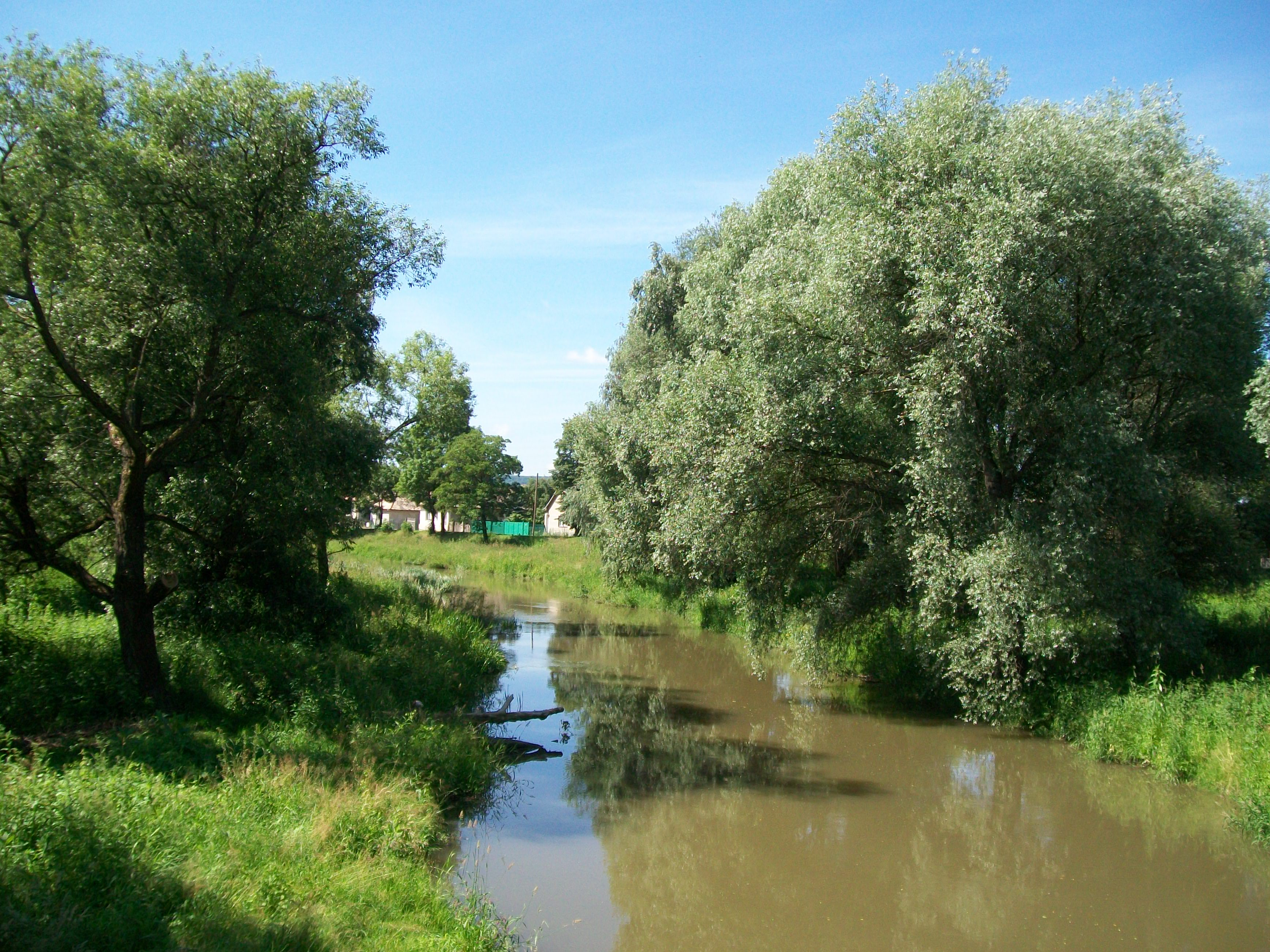 Rieka Ipeľ pretekajúca obcou Nitra nad Ipľom